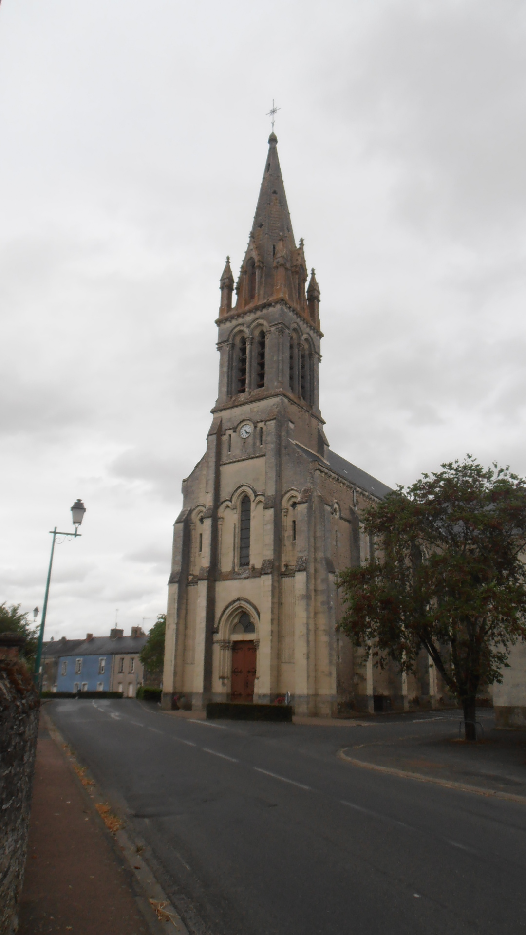 Église d'Angrie (Maine-et-Loire, France).